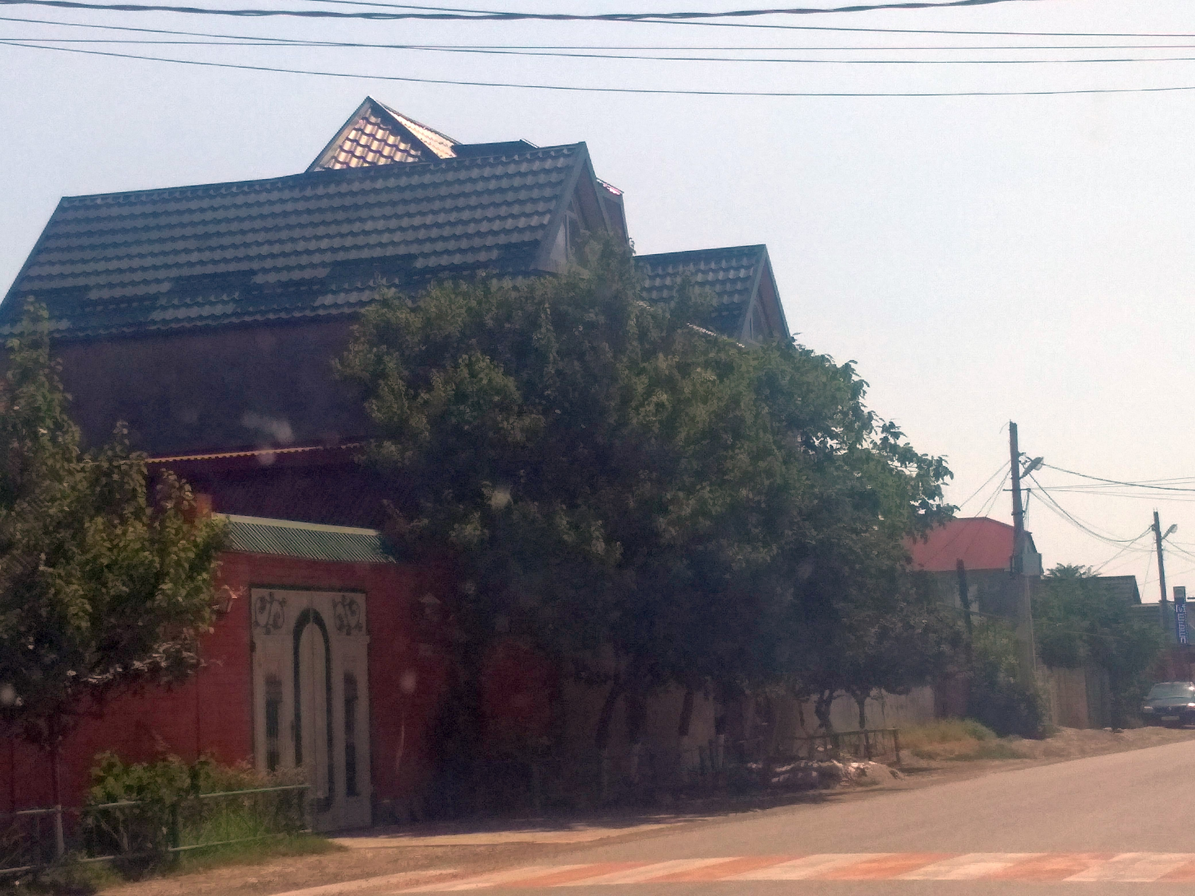 Нохчийн: Бабаюртара Ленинан урам